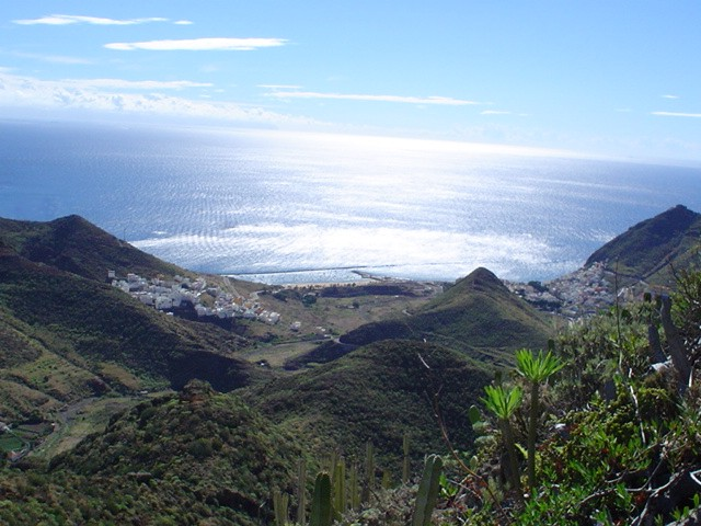 Imagen del Valle de San Andrés, en Tenerife.